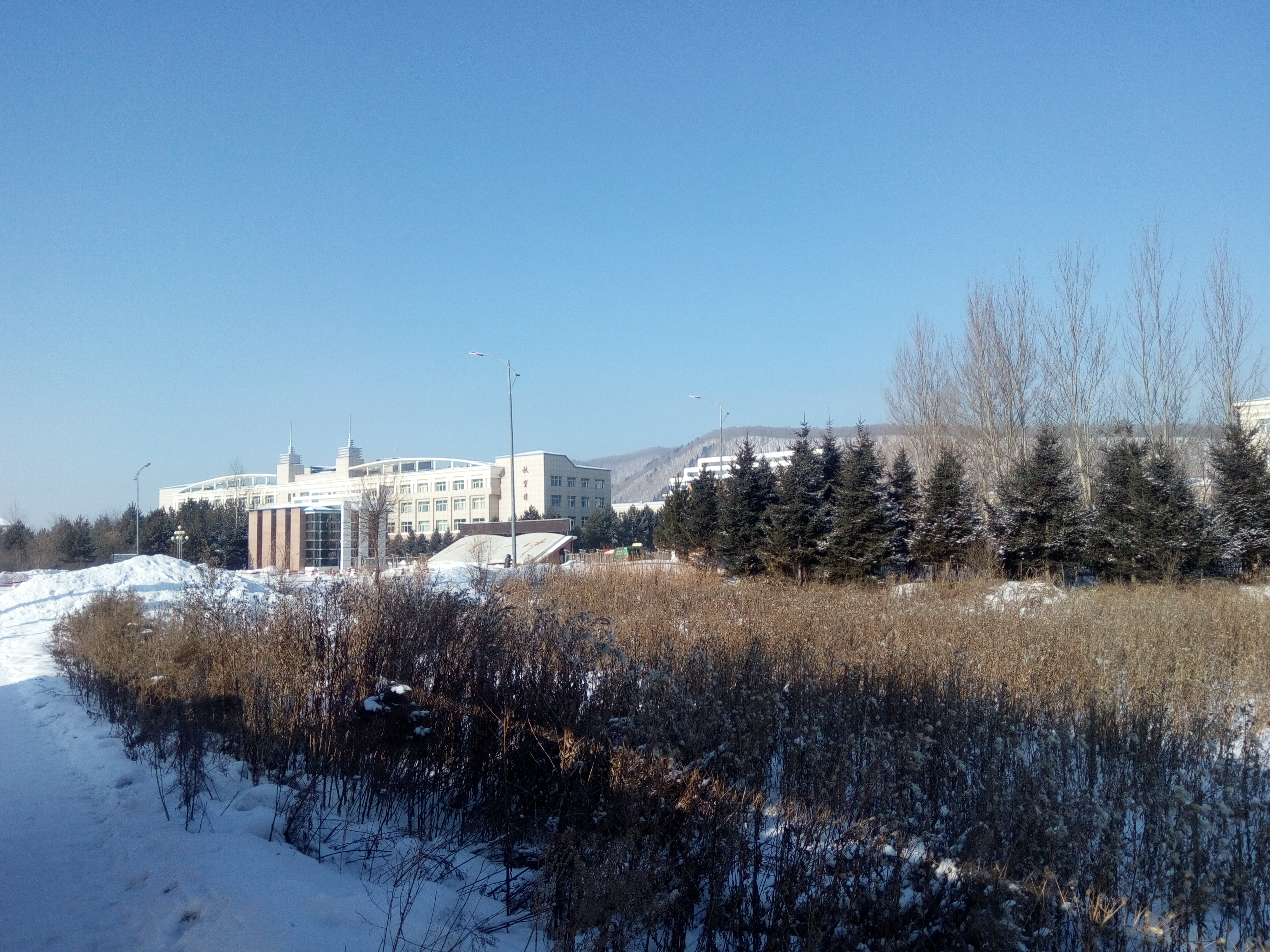 伊春市一中外部景观